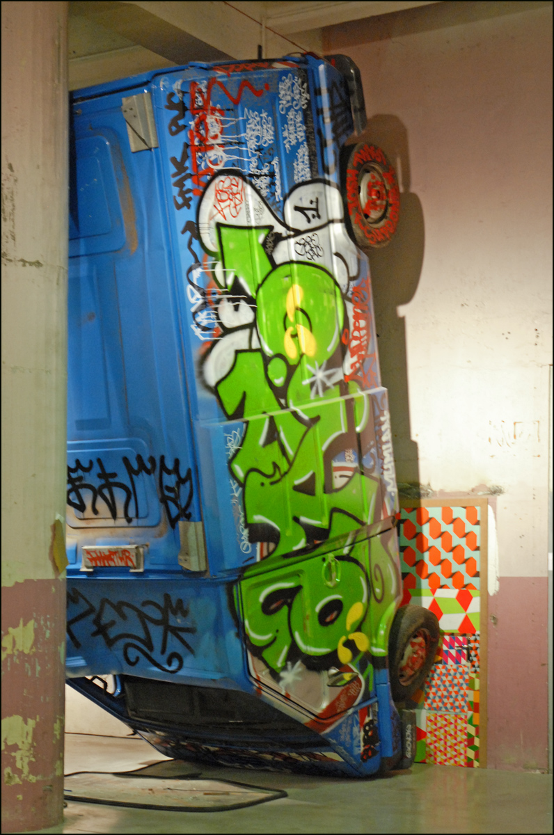 Installation 2009 oeuvres de Barry McGee (1966, San Francisco) La Sucrière Xe Biennale de Lyon "Le spectacle du quotidien" Commissaire : Hou Hanru